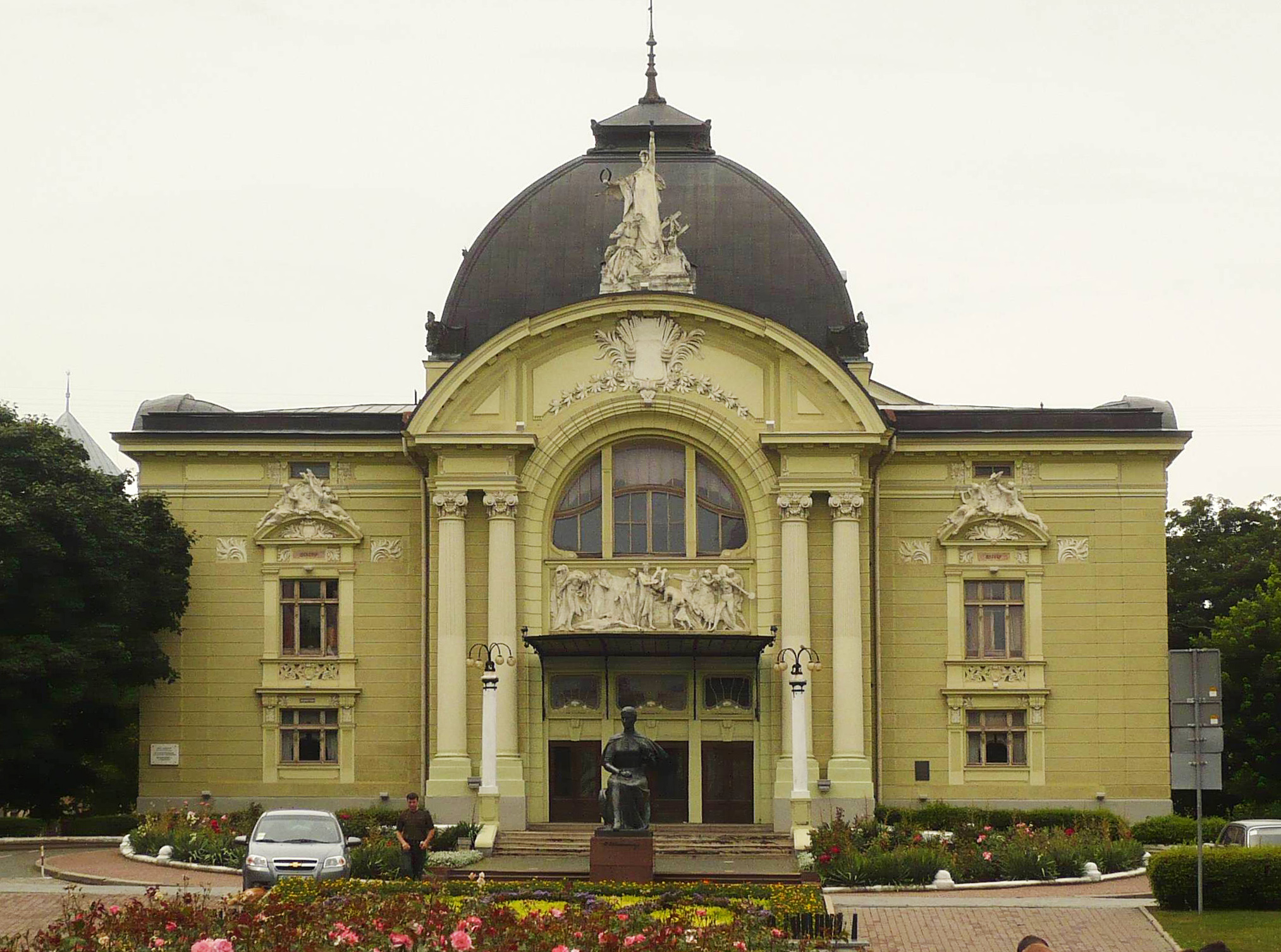 Czerniowce, teatr, 2009 r.